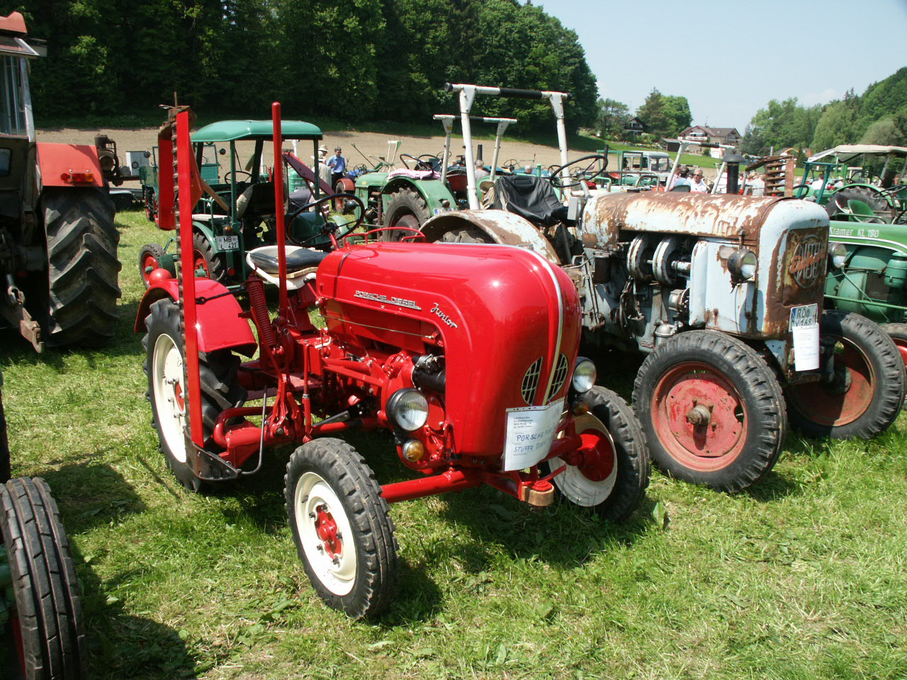 Porsche-Diesel Junior F108, Baujahr 1958